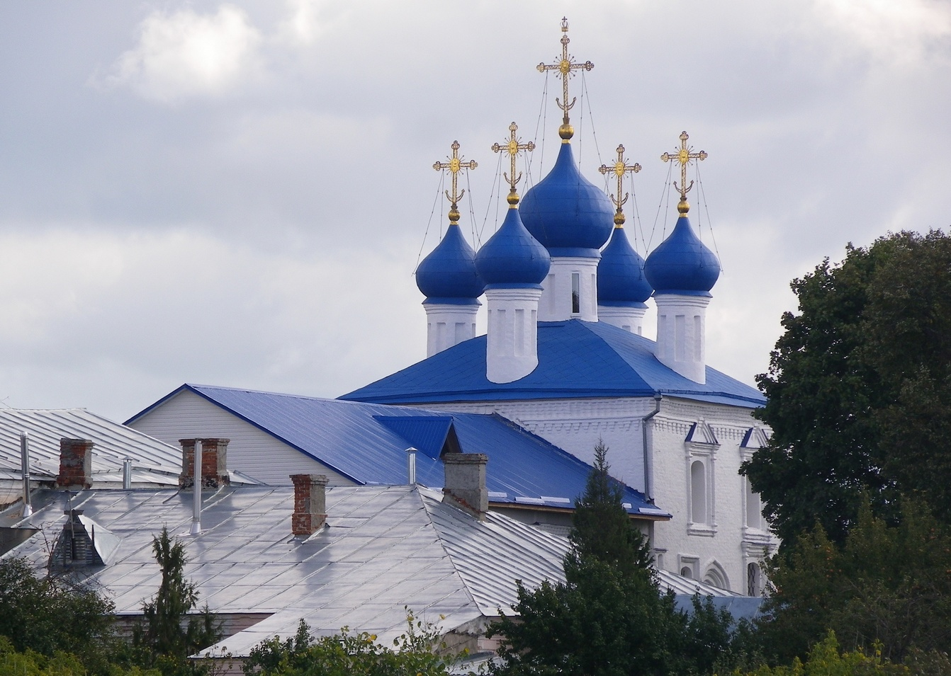 Вид на Старо-Покровский собор через овраг Верхний Судок